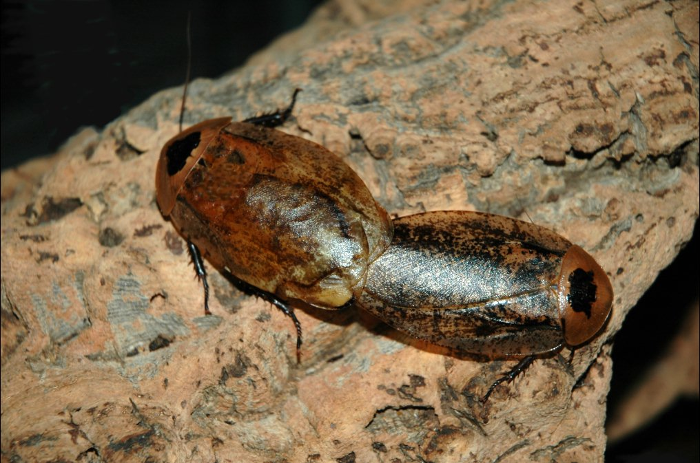 photo de blattes